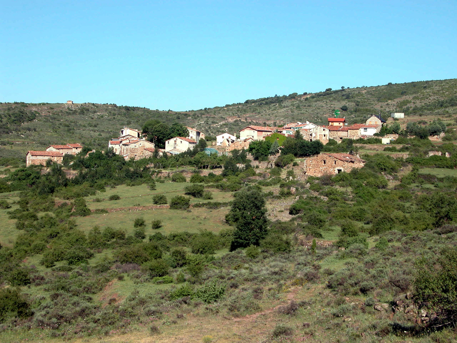 Zenzano, aldea de Lagunilla del Jubera en La Rioja (España).